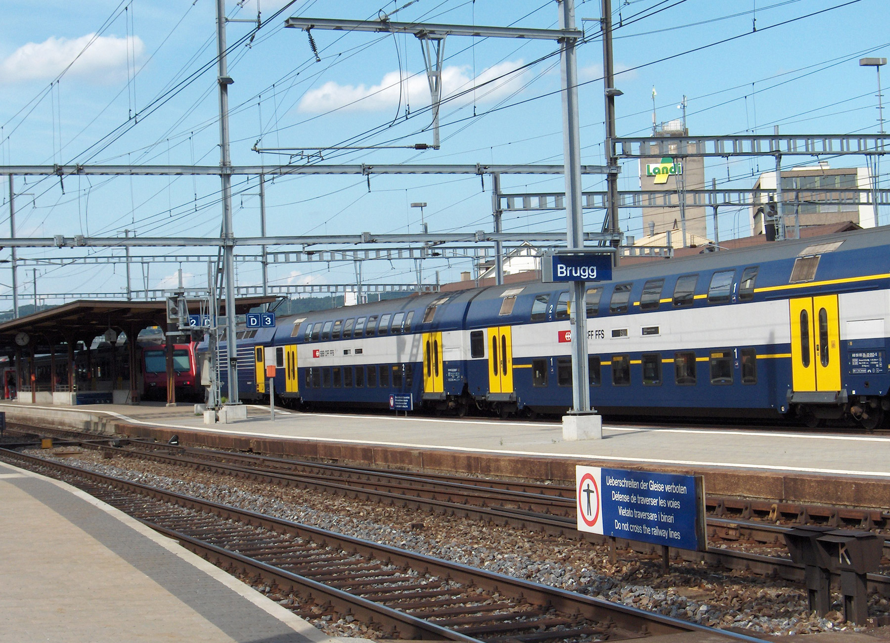 Ein S-Bahn-Zug fährt in den Bahnhof Brugg ein Fotografiert durch Voyager, 28. Juni 2006 A S-Bahn train arrives at Brugg railway station Fotografiert durch Voyager, 28. Juni 2006